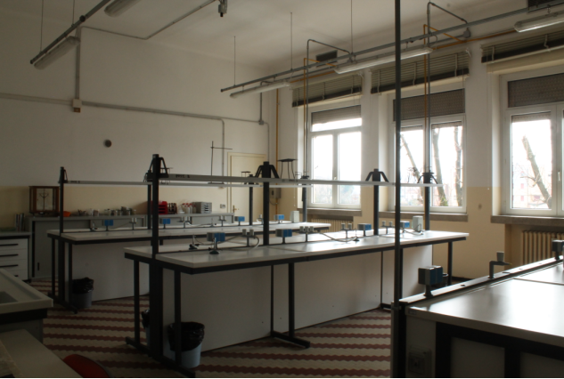 laboratorio scienze istituto tecnico commerciale ambrogio fusnieri